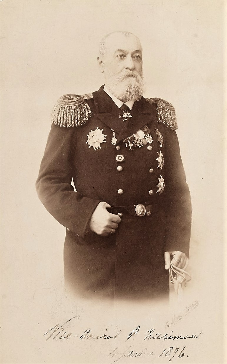 Русский мореплаватель Павел Николаевич Назимов в звании вице-адмирала